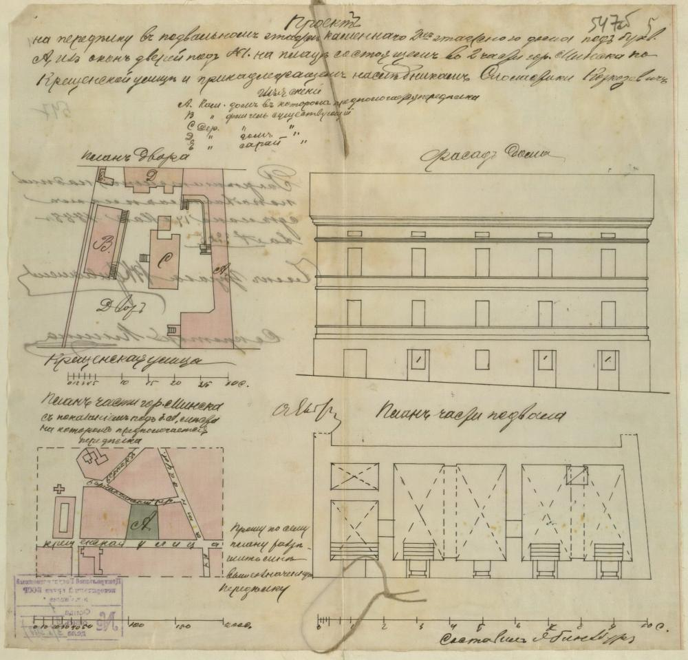 Беларуская (тарашкевіца): Менск (Miensk), вуліца Валоцкая (vulica Vałockaja). Праект на рэканструкцыю мураванага трохпавярховага жылога дома Каркузевічаў (Karkuzievič)